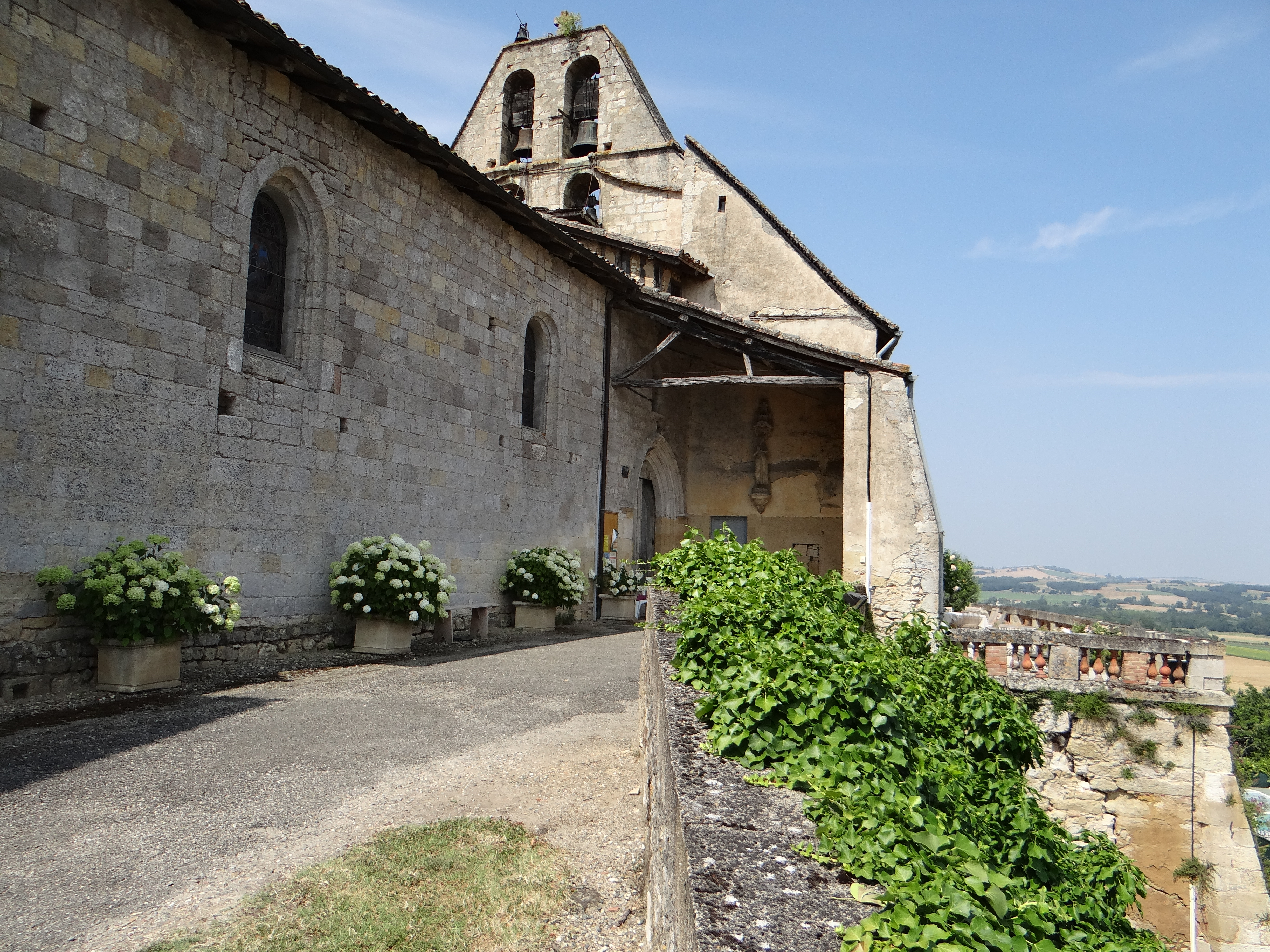 La chapelle - Église Saint-Pierre - L'entrée de l'église et la terrasse de l'ancien château